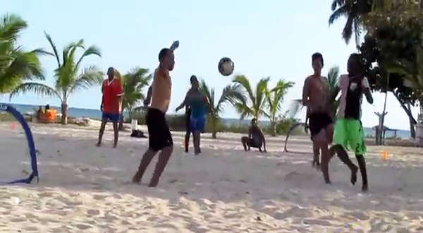 Futbol playero en SPM